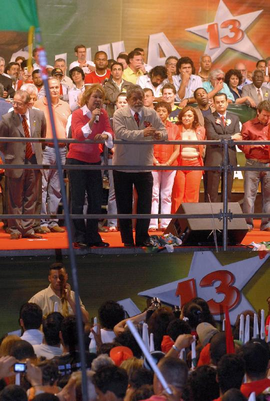 A ex-prefeita Marta Suplicy ao lado do candidato Luiz Inácio Lula da Silva olha o público durante seu último comício de campanha na periferia de São Paulo.